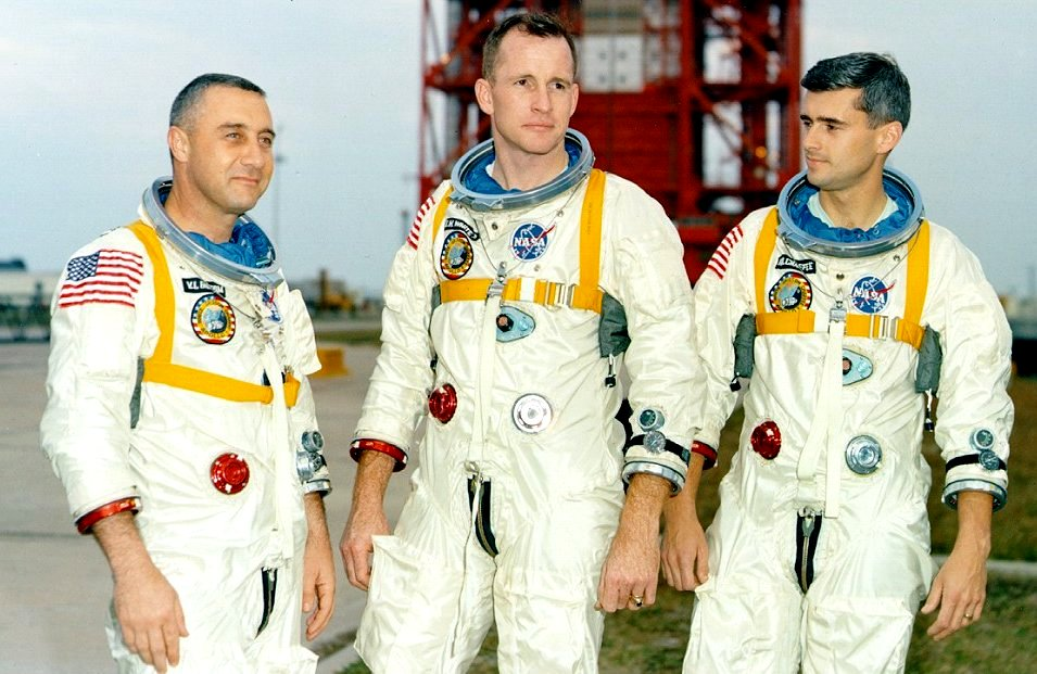 Die Apollo 1 Crew – v. l. n. r. Grissom, White und Chaffee vor der Abschussrampe in Cape Canaveral ein paar Tage vor dem Unglück bei einer Pressevorstellung. Die Crew von Apollo 1 - v.l.n.r. Grissom, White und Chaffee.